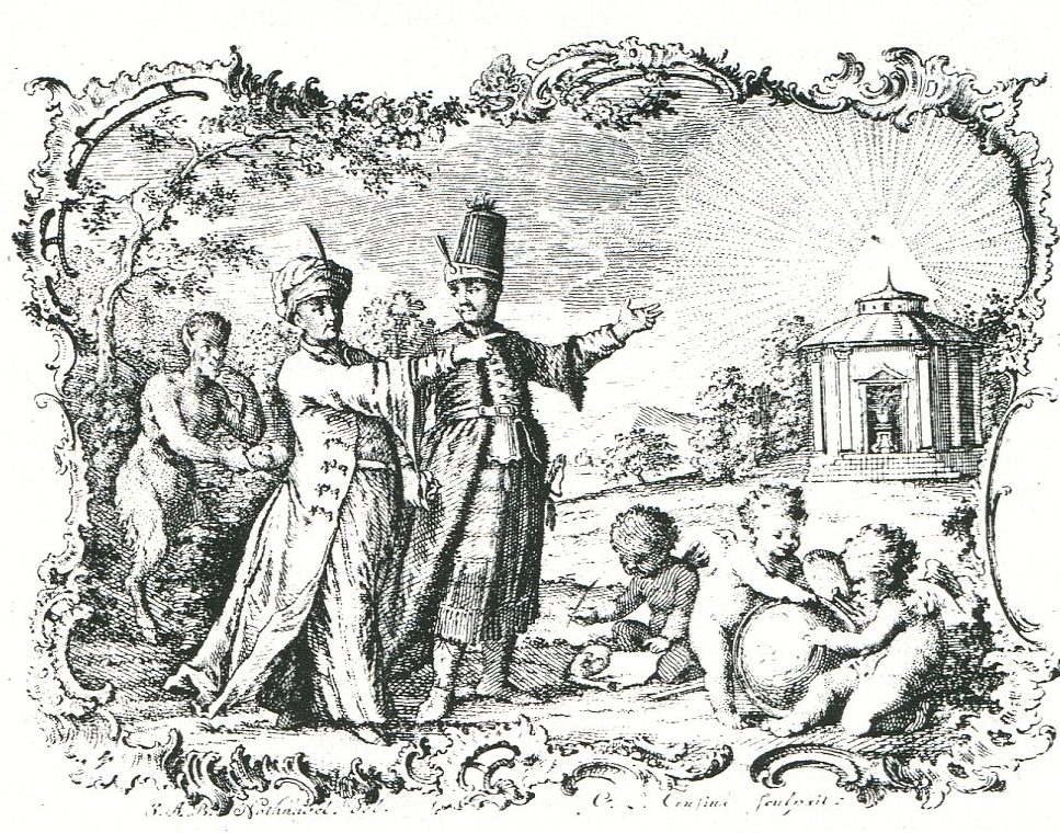 Titelvignette von der Erstausgabe der Persianischen Briefe von Montesquieu